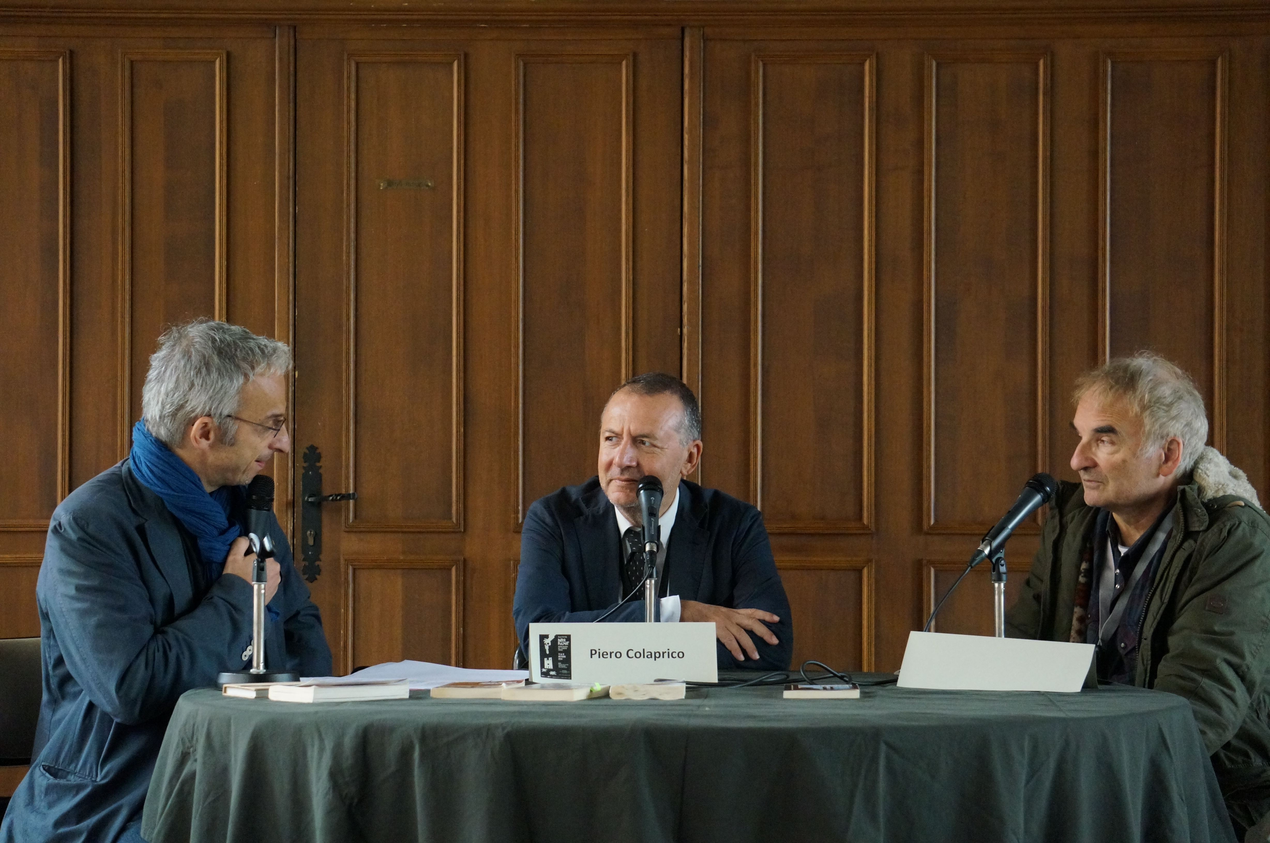 lors du 9e Festival Interpol'art.